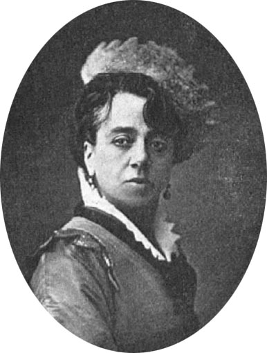 Marguerite Macé-Montrouge à l'Athénée-Comique en 1877